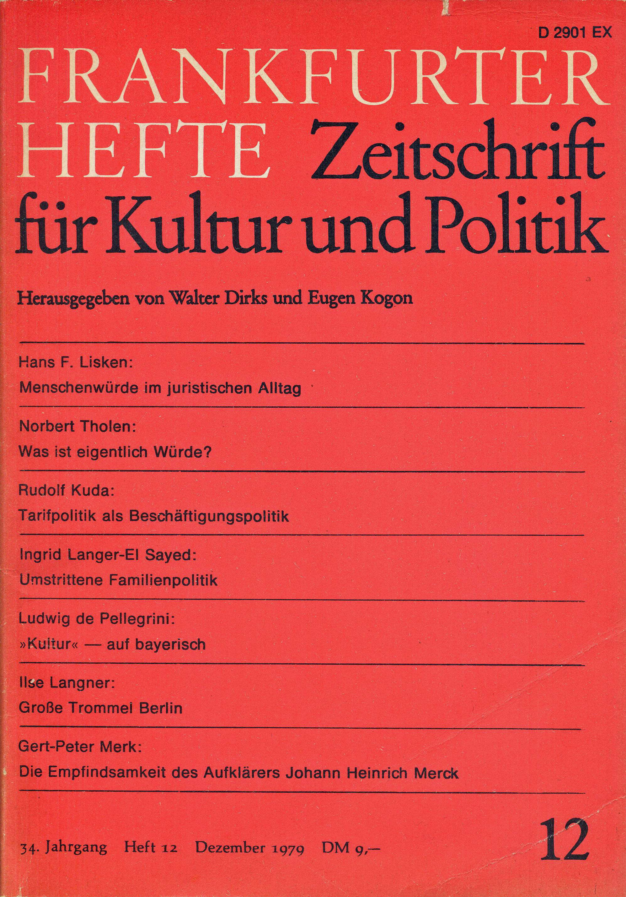 Cover der Frankfurter Hefte, Heft 12, 1979.